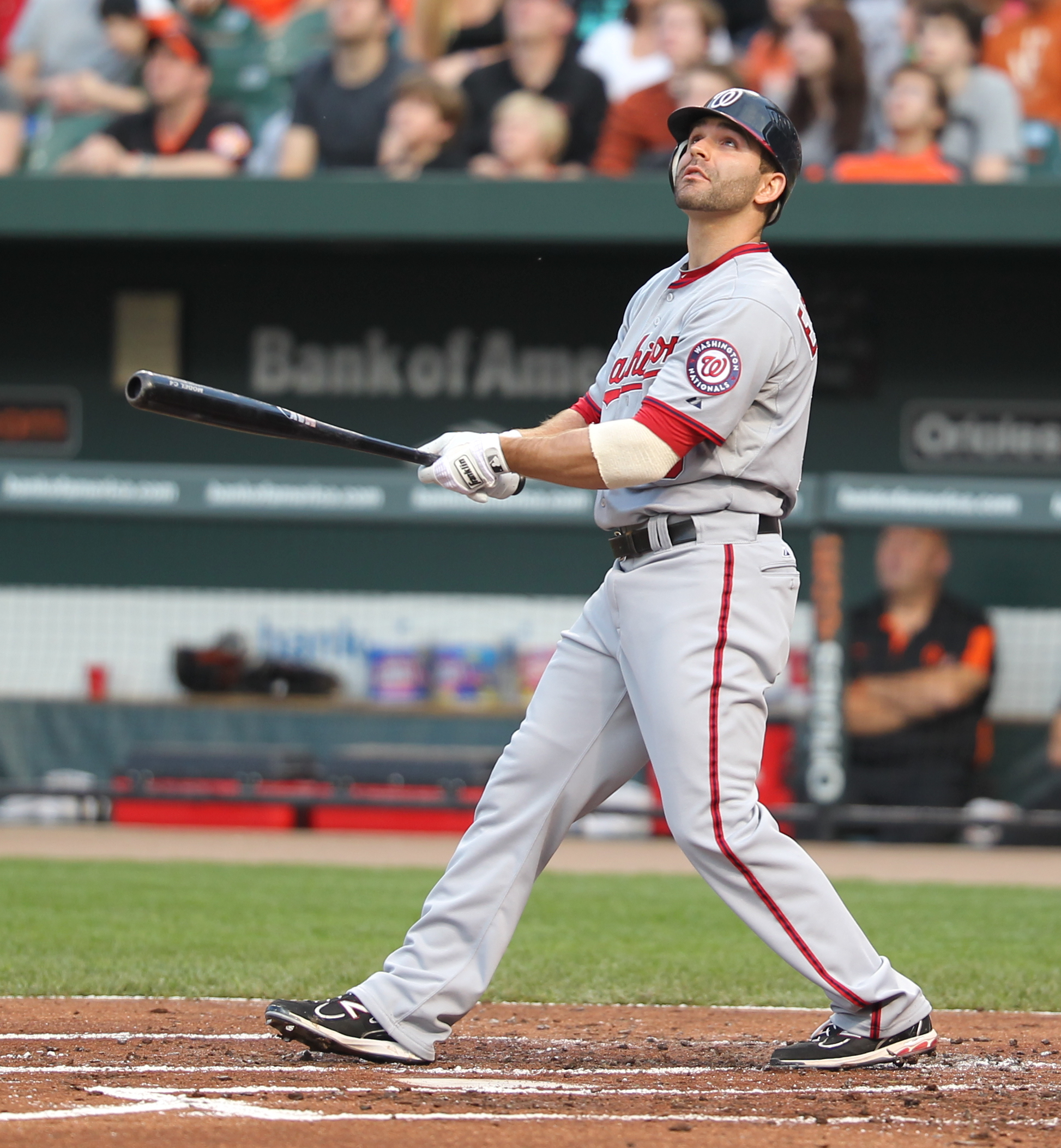 Danny Espinosa